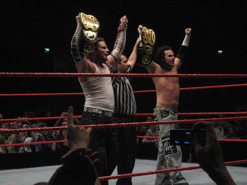 Die Hardys nach einer erfolgreichen Tag-Team-Titel-Verteidigung (WWE Houseshow am 19.04.2007 in der Olympiahalle zu München)